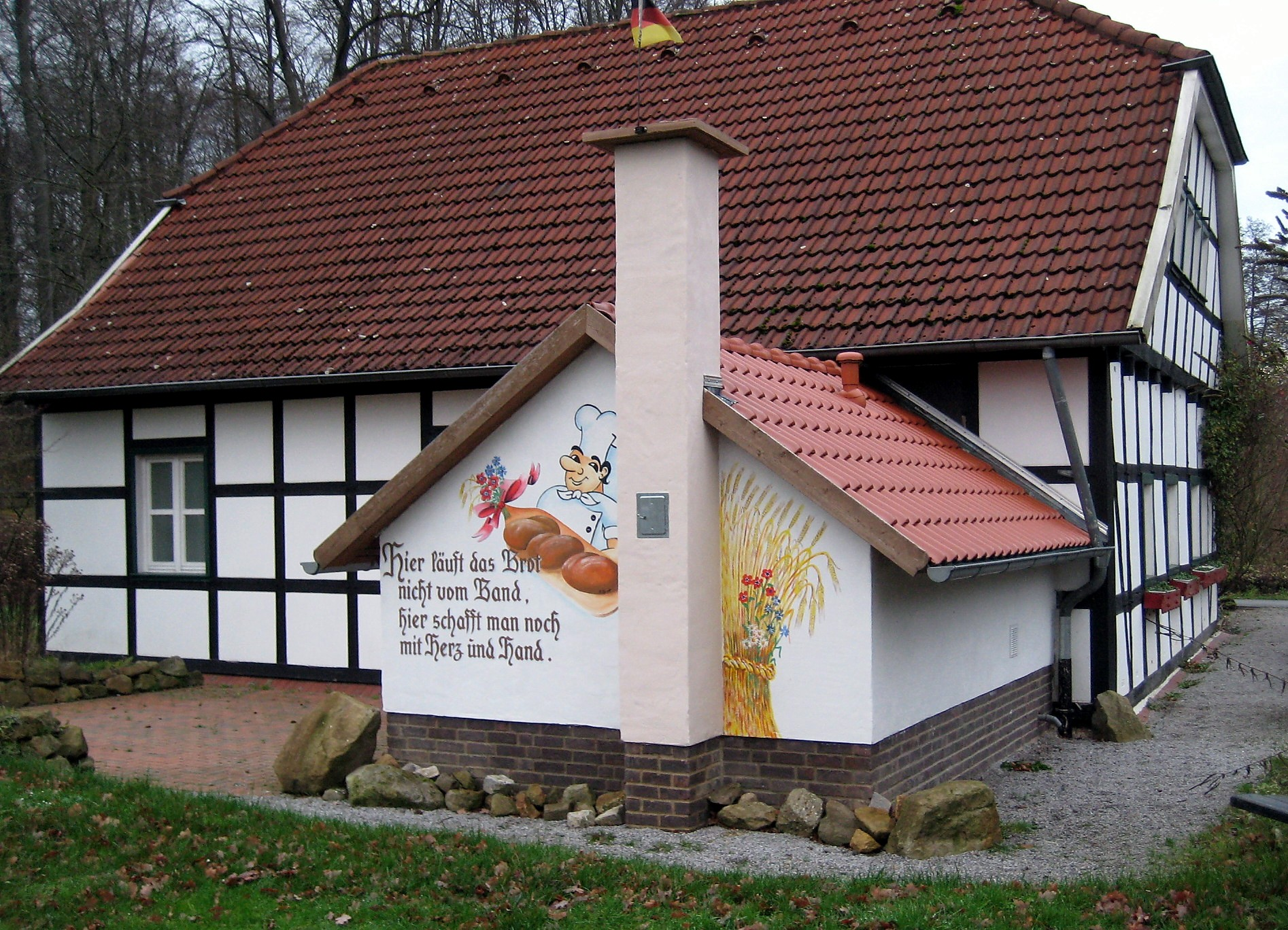 Backhaus im Kurpark in Rödinghausen, Kreis Herford, Nordrhein-Westfalen.